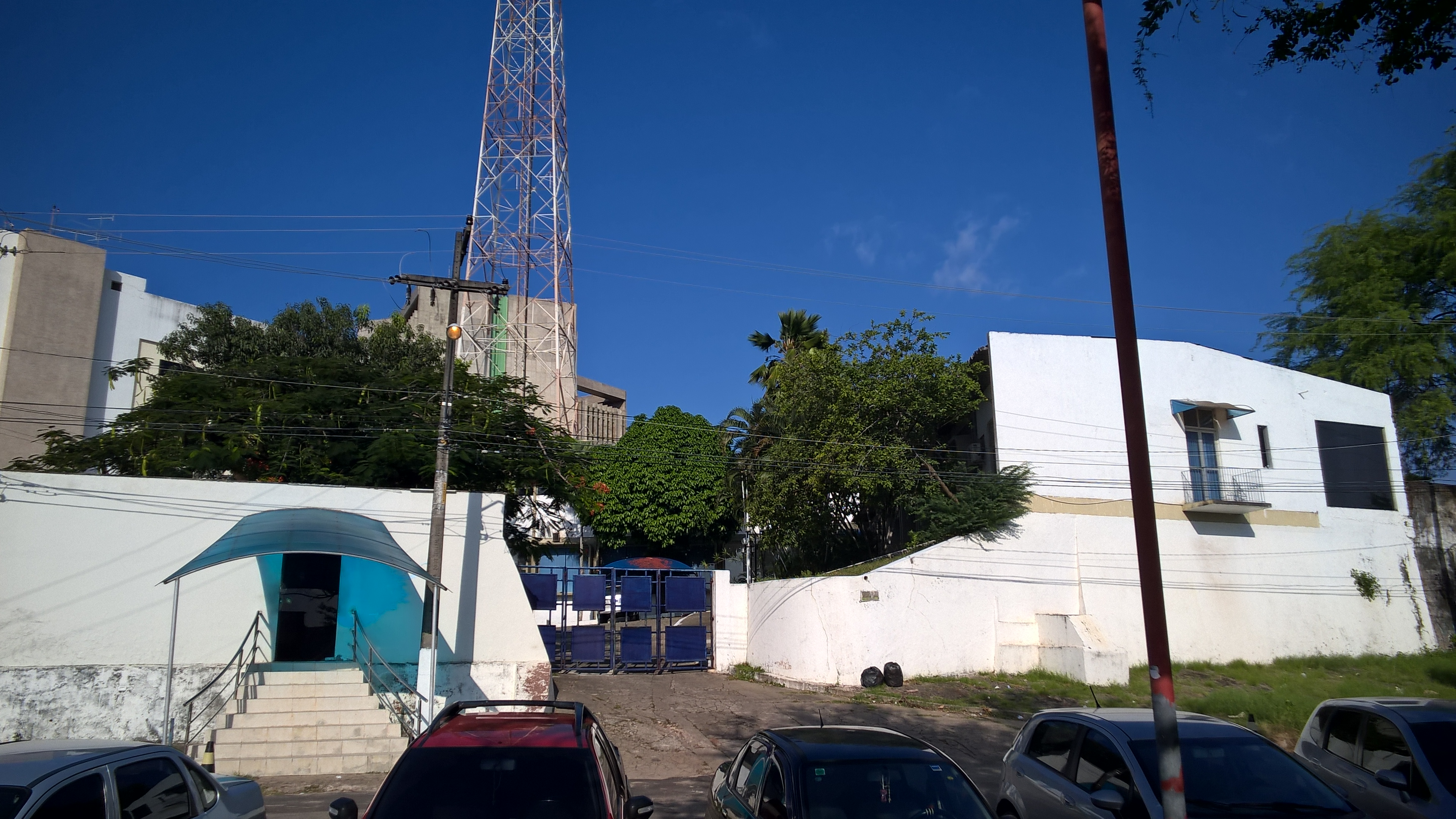 Sede da TV Cidade, emissora de televisão sediada em São Luís, MA - Brasil